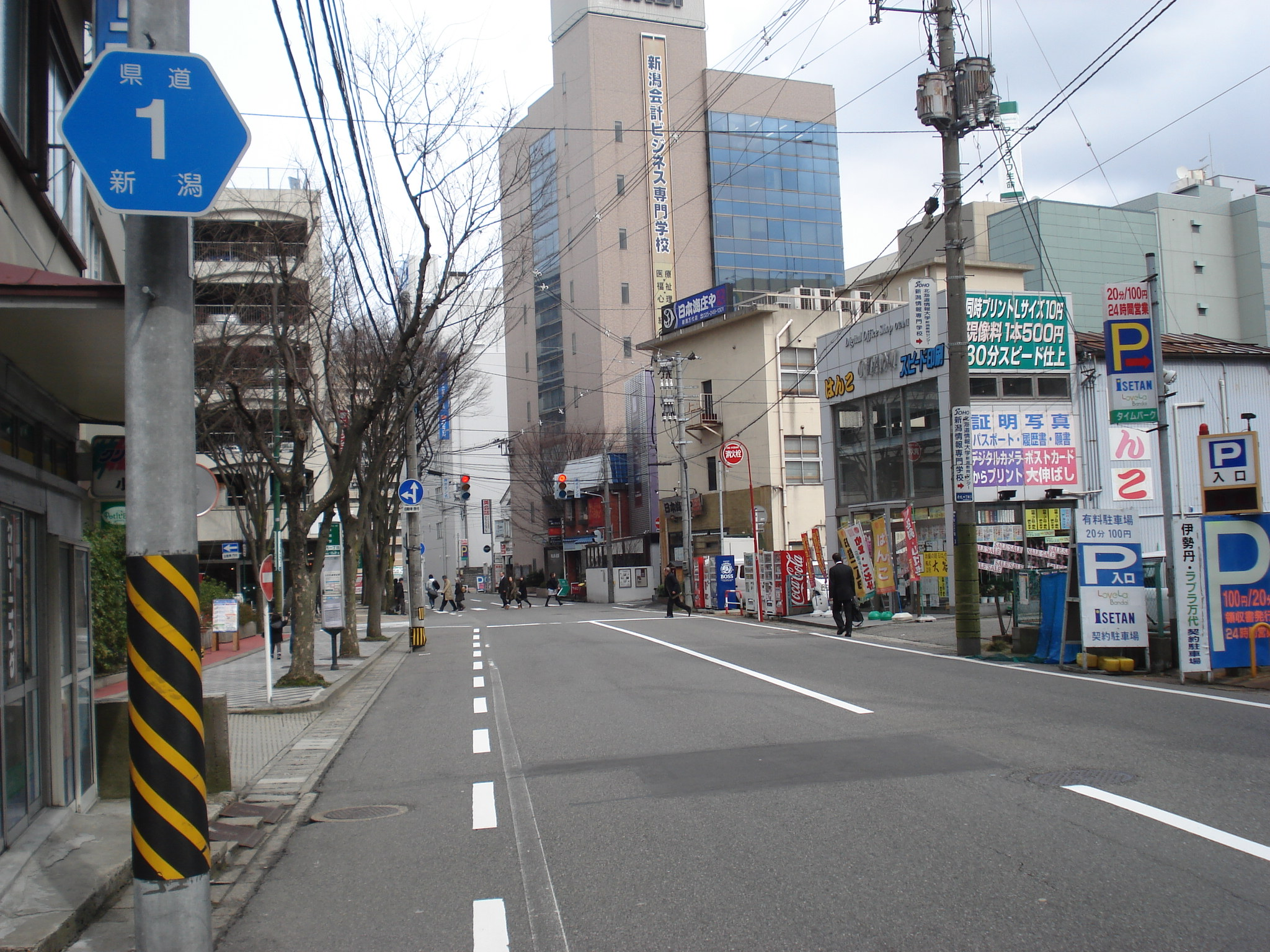 新潟県道1号 新潟小須戸三条線 新潟県新潟市中央区万代1丁目付近